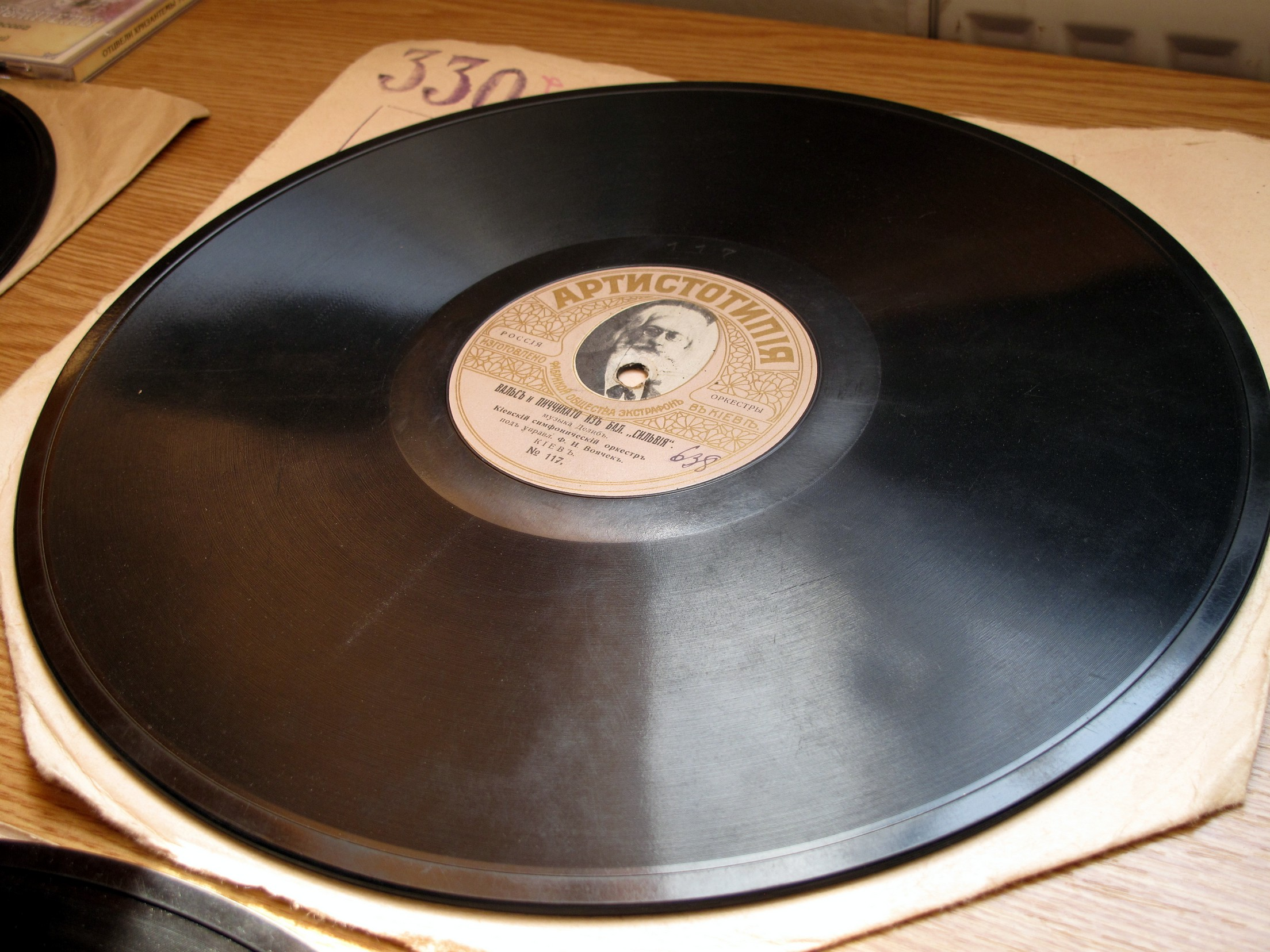 Платівка з Відділу музичних фондів НБУВ